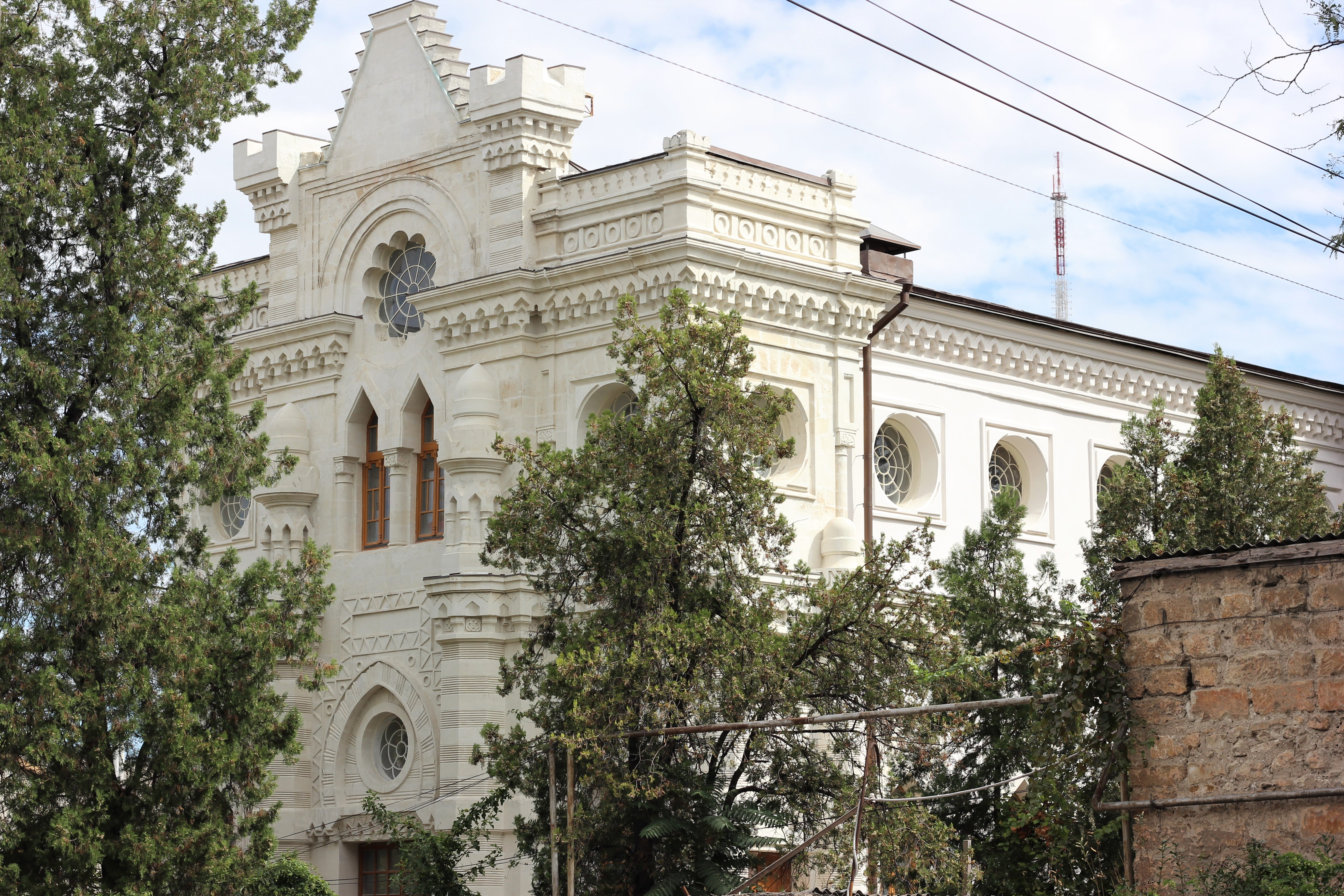 Будинок колишньої кенаси, Сімферополь, вул. Караїмська, 6, літ. А